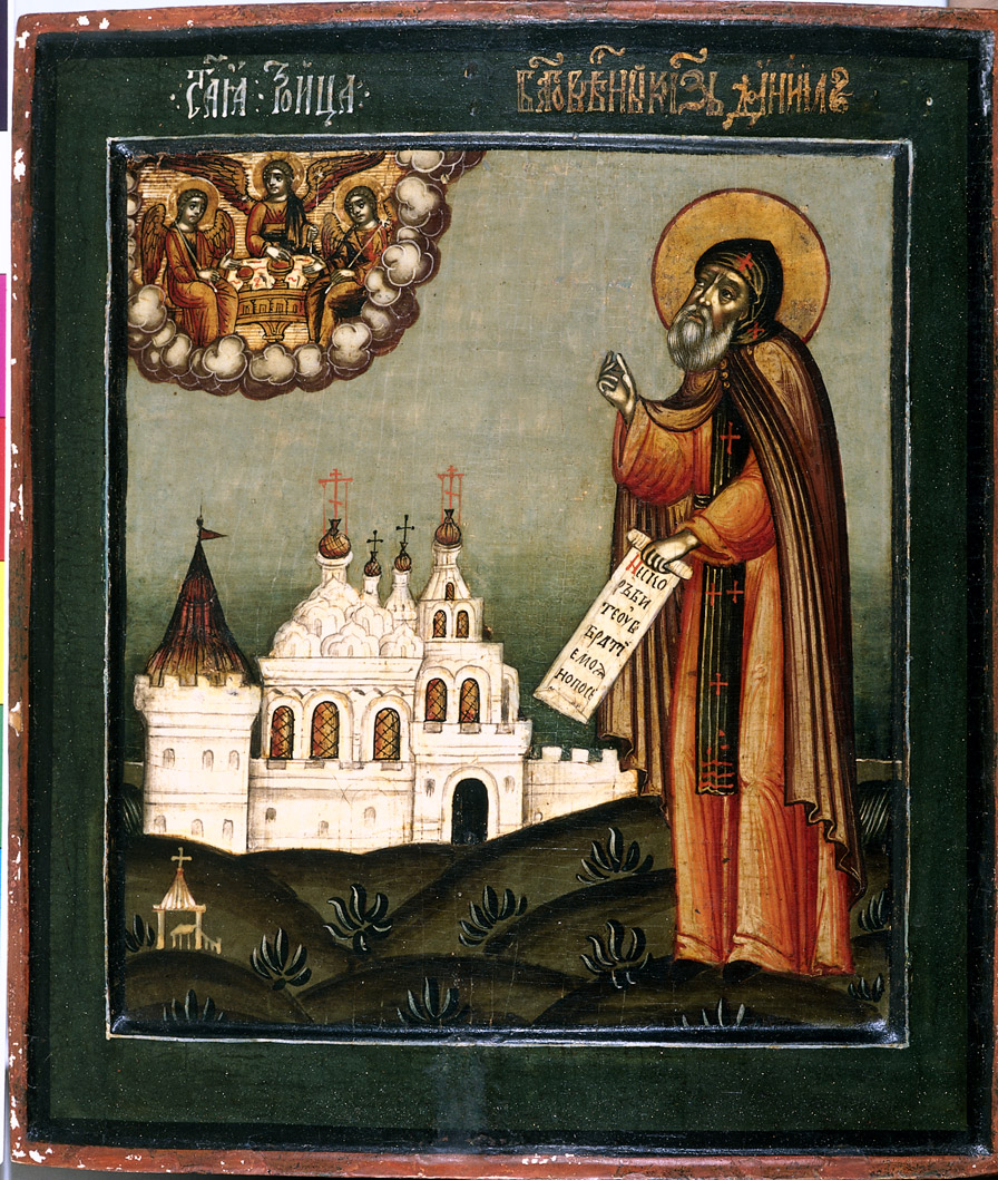 Святой благоверный князь Даниил Московский. Икона рубежа XVII-XVIII веков